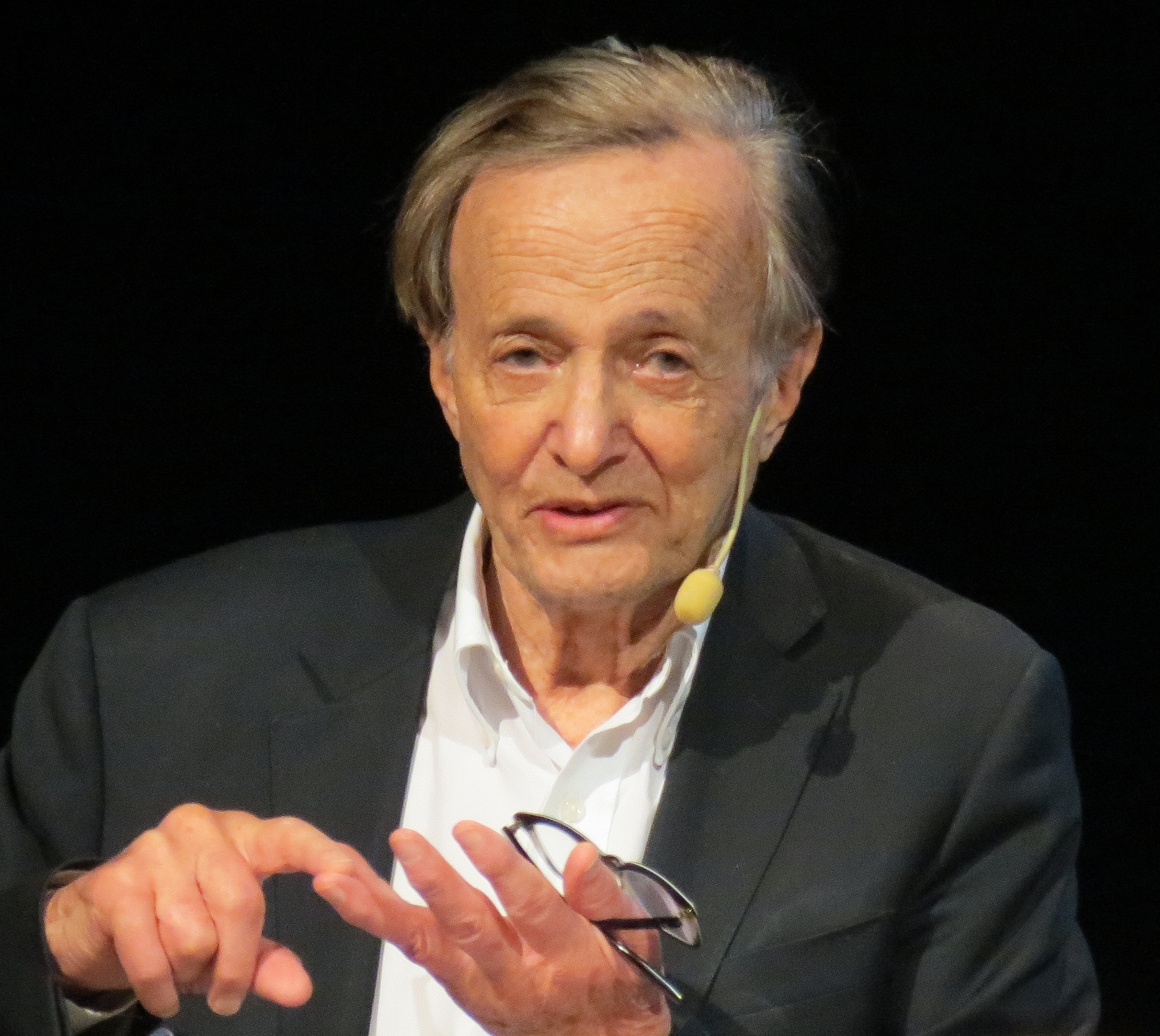 Nobelpristagaren i kemi 1986, den numer 90-årige John C. Polanyi, argumenterar för en illegalisering av kärnvapen som årets Nobelföreläsare vid Chalmers Tekniska Högskola i Göteborg den 8 december 2019.